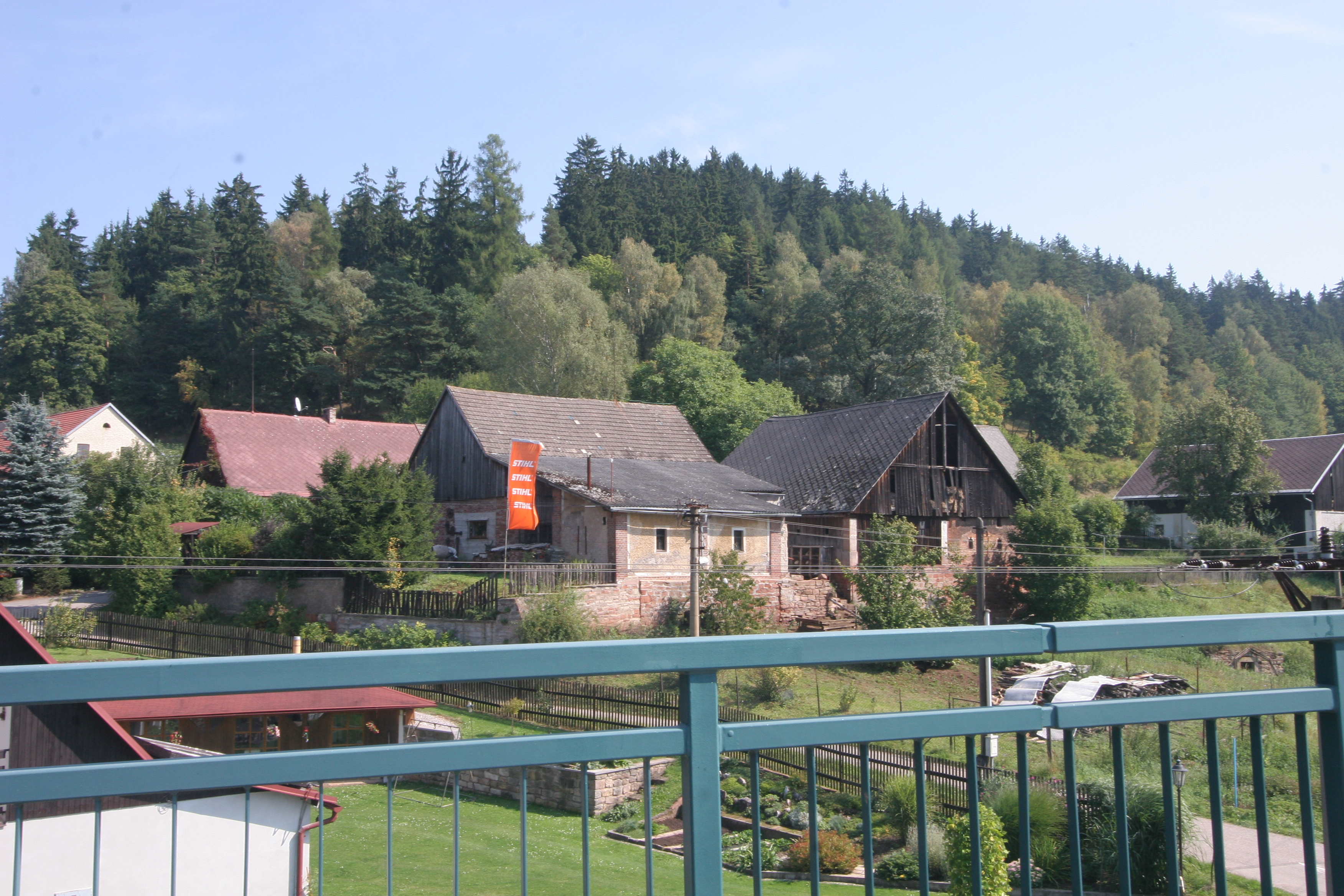 Bojiště čp. 59